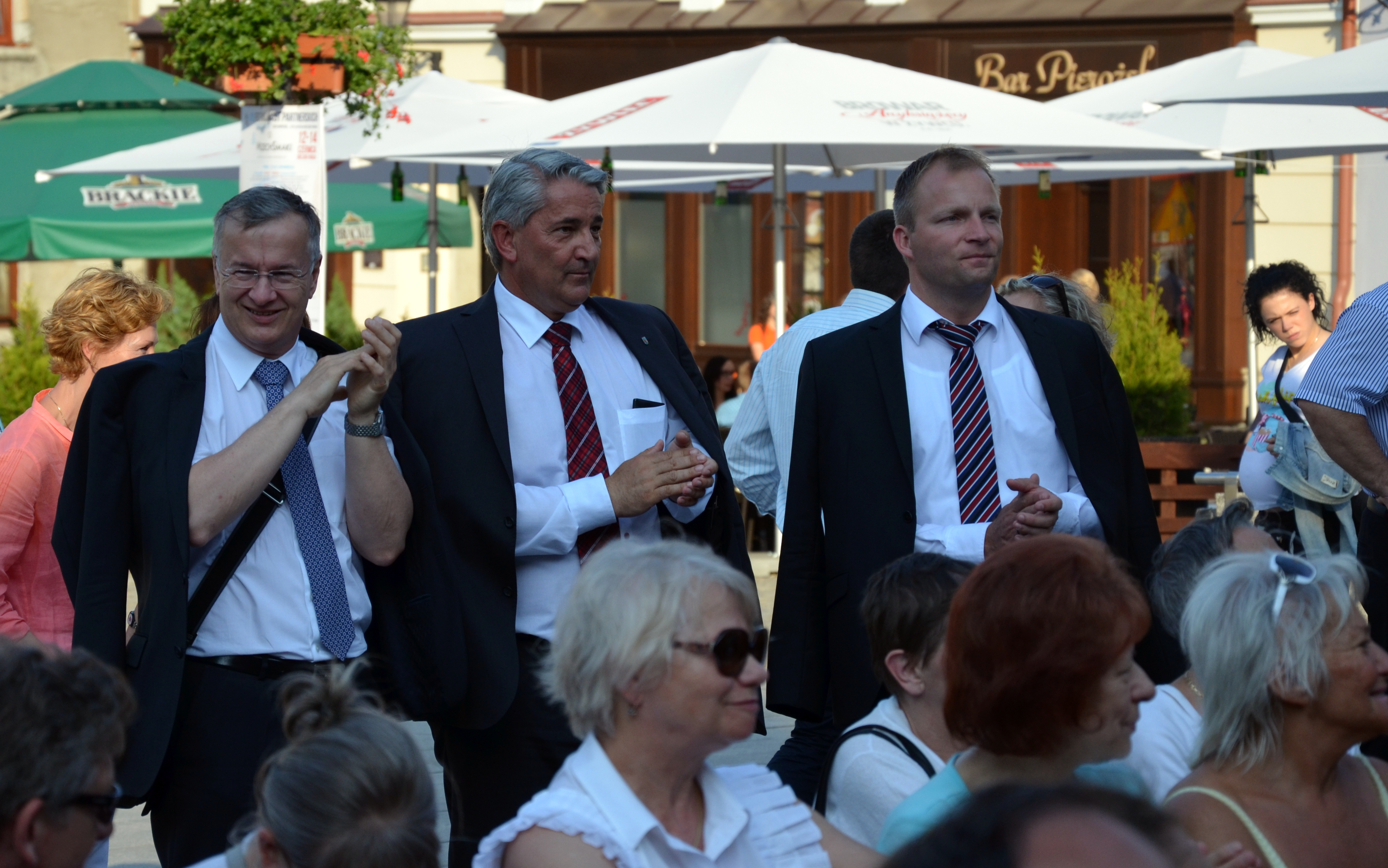 Österreichische Politiker als Gäste bei Festival-Partnerschaften in Bieltz-Biała